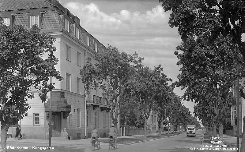 Kungsgatan. Motiv: Söderhamn Kategori: StadsmiljöKungsgatan.